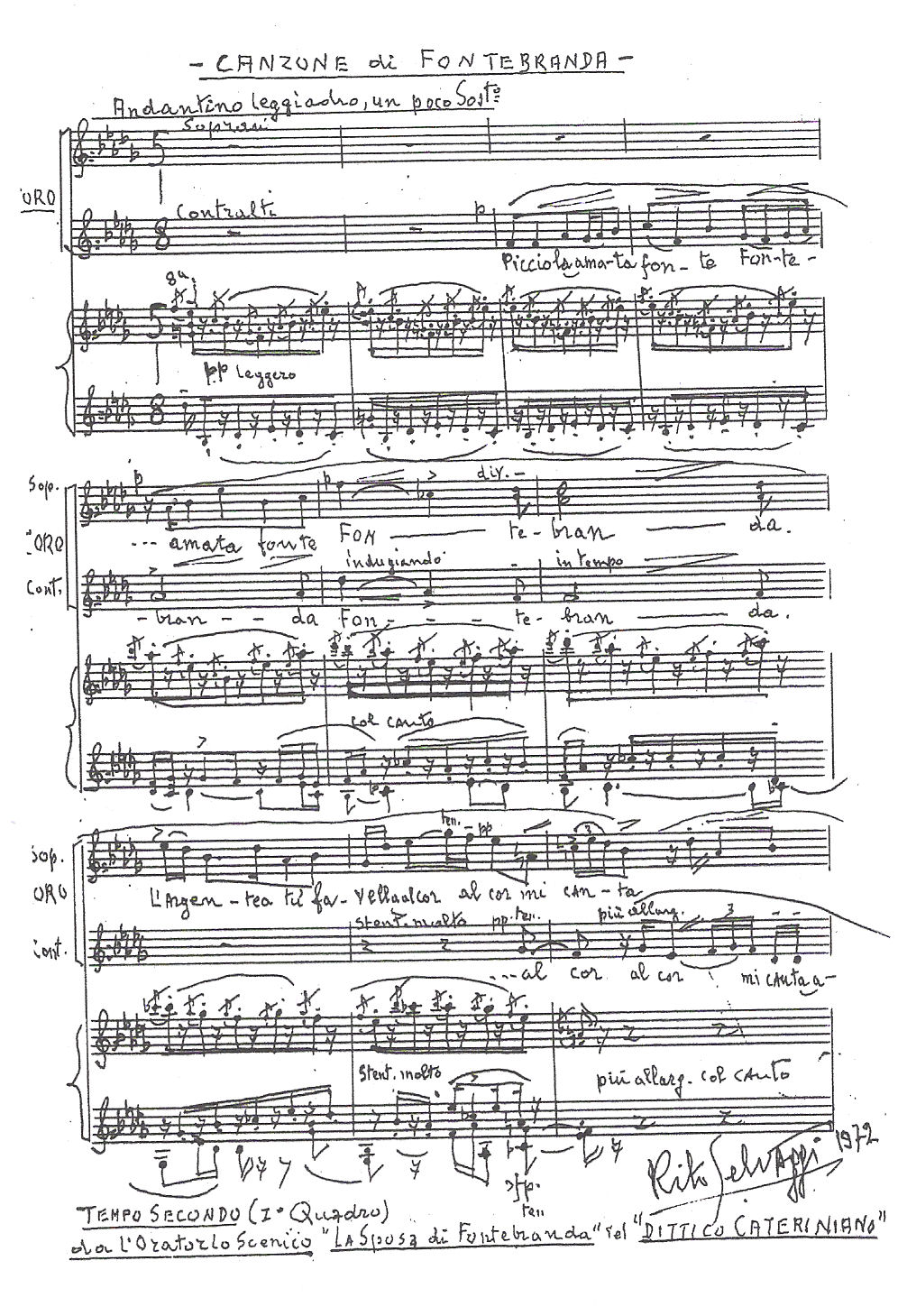 spartito della Canzone di Fontebranda con autografo del M° Rito Selvaggi